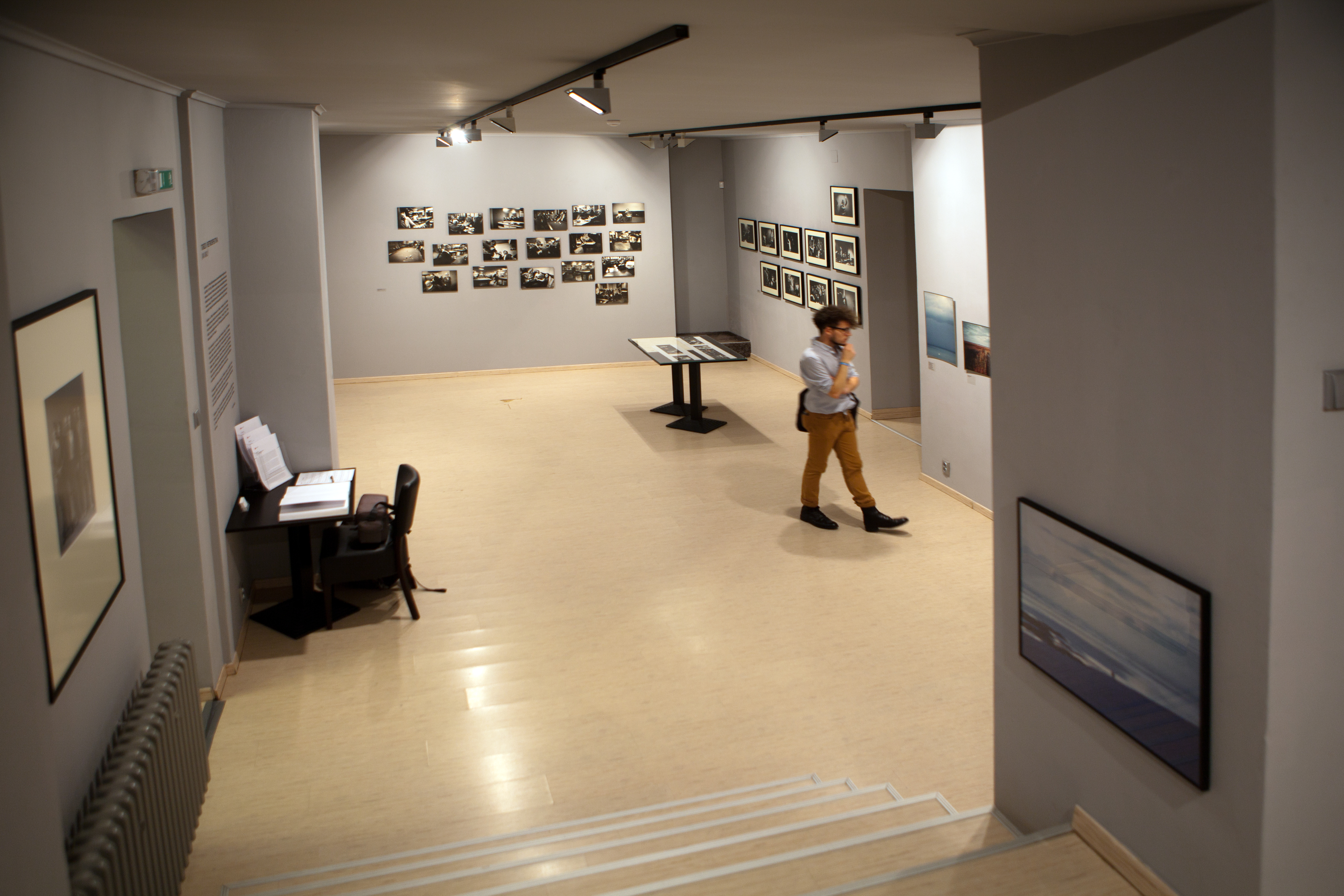 Jan Malý, Výstava Torzo I Retrospektiva, Leica Gallery Prague, 13. září — 3. listopad 2013